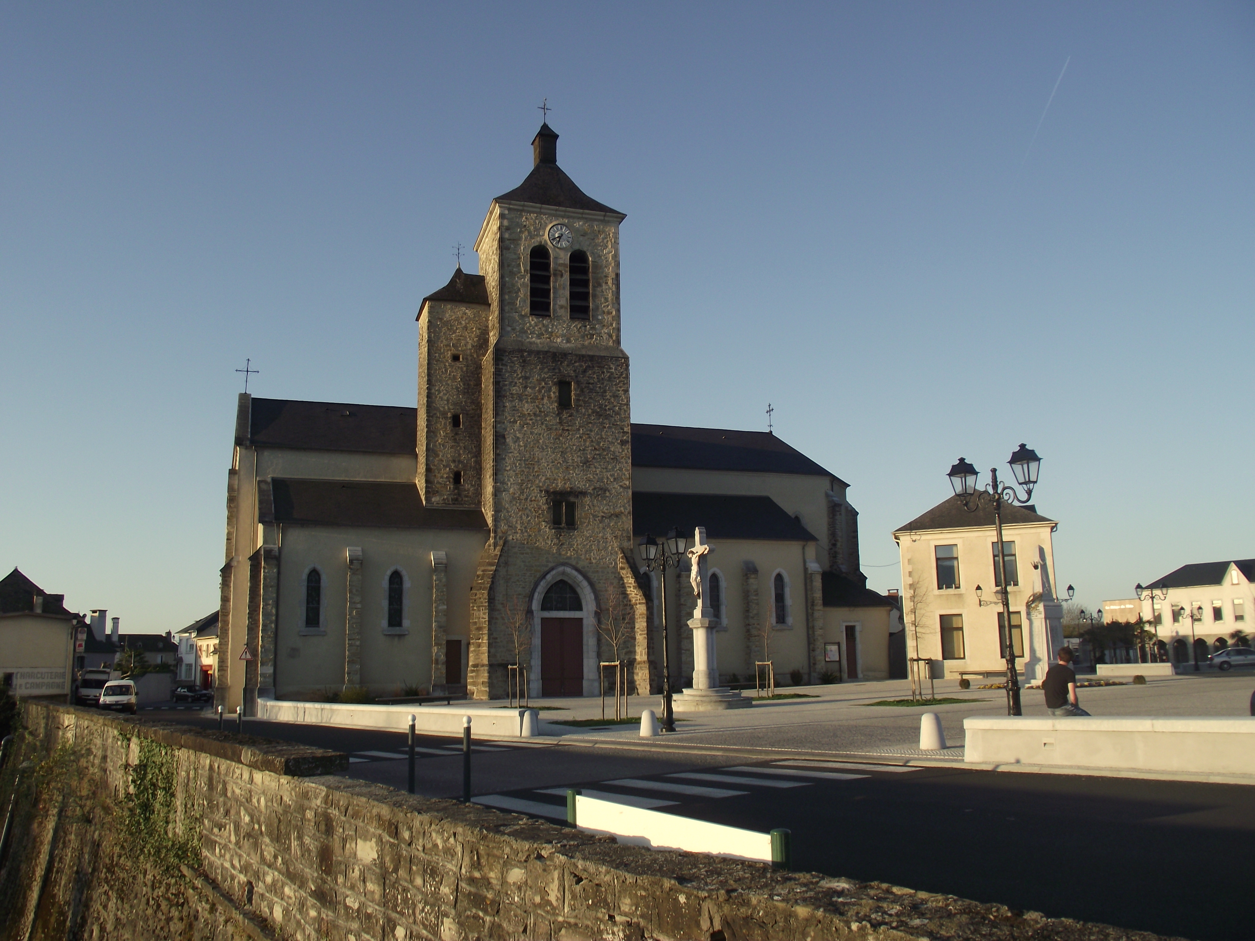 Église Saint-Vincent-Diacre de Coarraze (Pyrénées-Atlantiques, France)